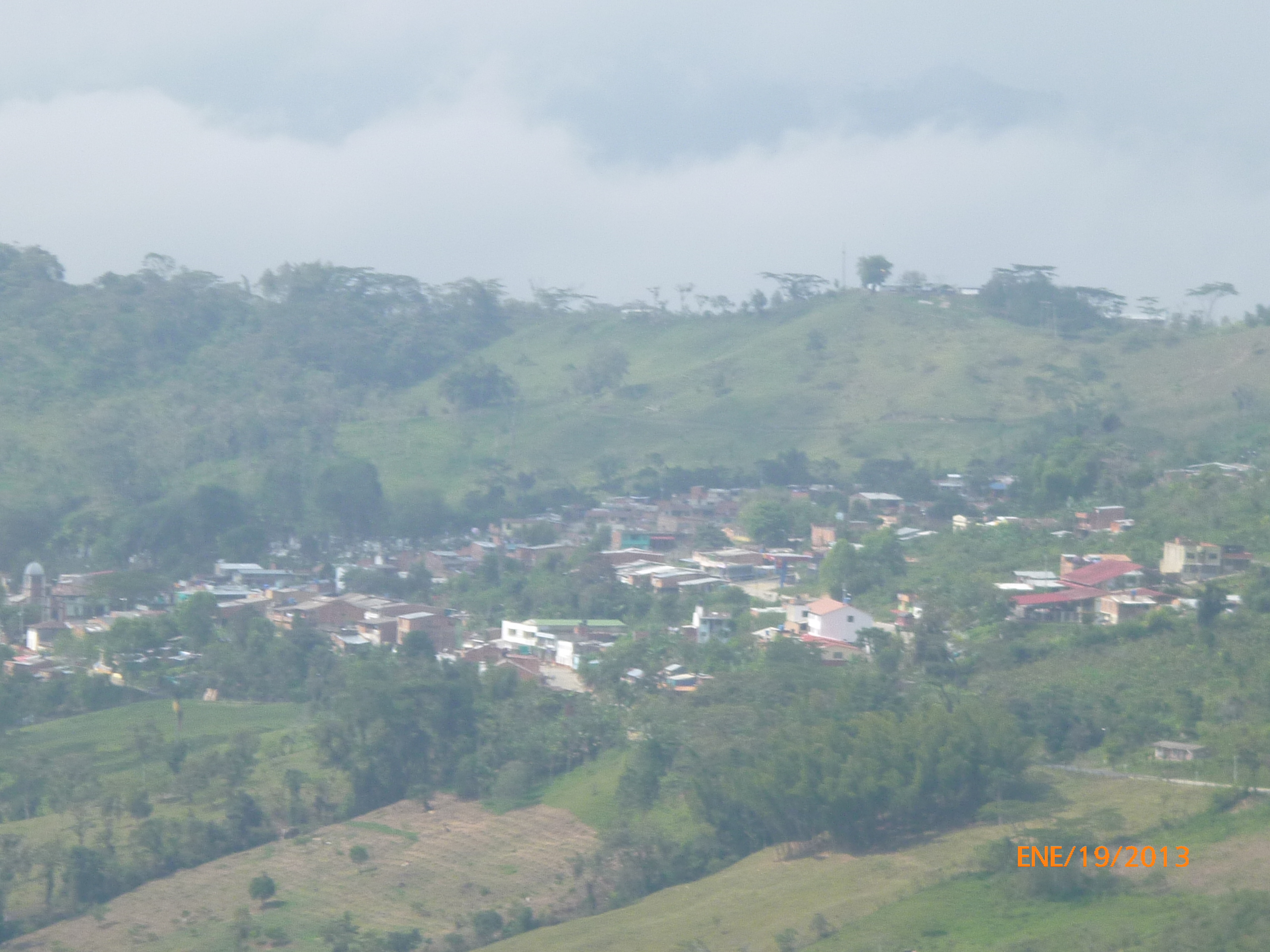 Florian